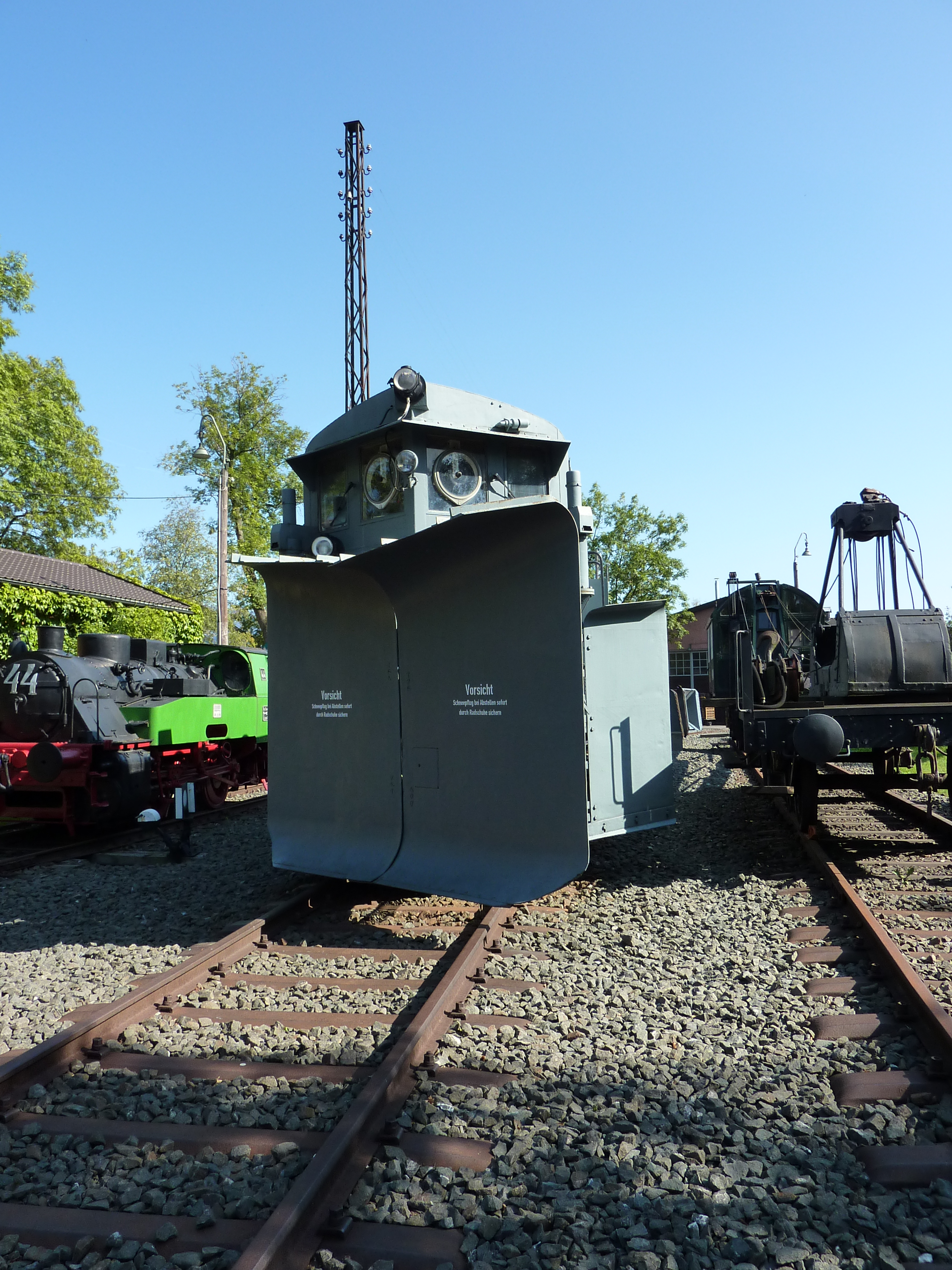 Deutsches Dampflokmuseum: Klima-Schneepflug, Frontansicht